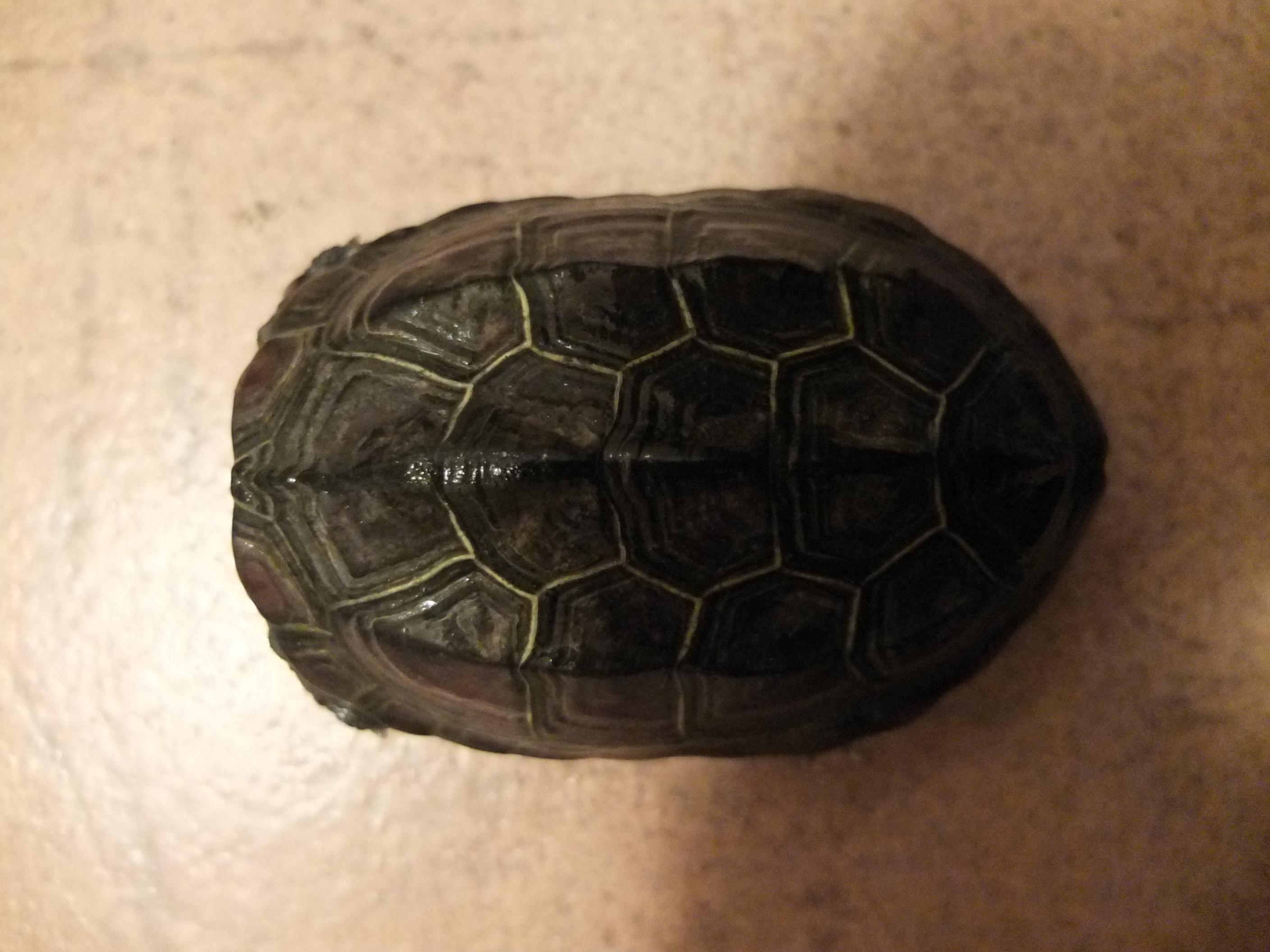 僕が飼育しているクサガメ(亜成体)の甲羅です。 撮影時の甲長10cm